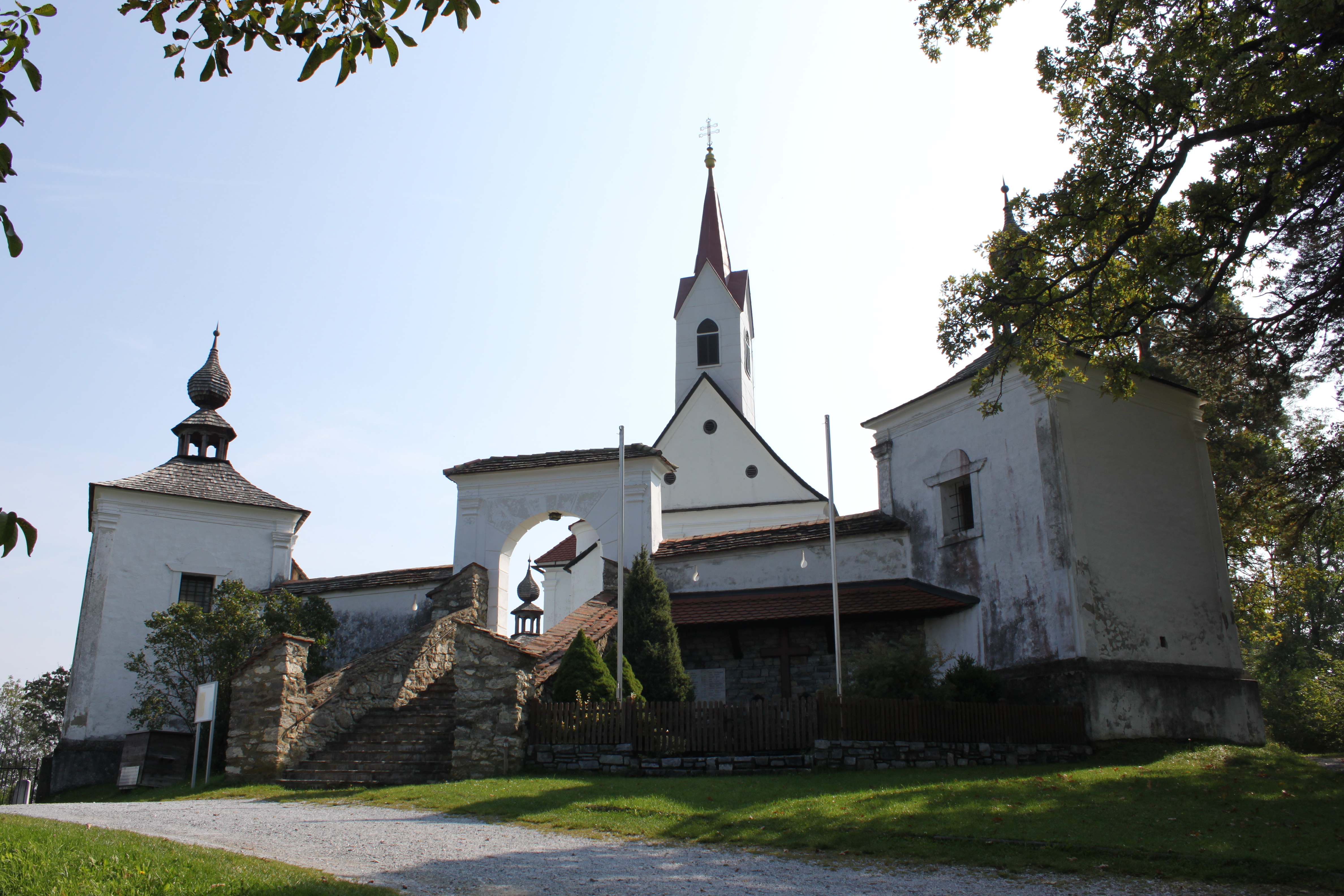 Loretokirche (Gutenberg an der Raabklamm), nördliche Initienkapelle, Haupttreppe mit offenem gedecktem Rundbogenportal, Kriegerdenkmal mit Vorzeichen überdacht, westliche Initienkapelle